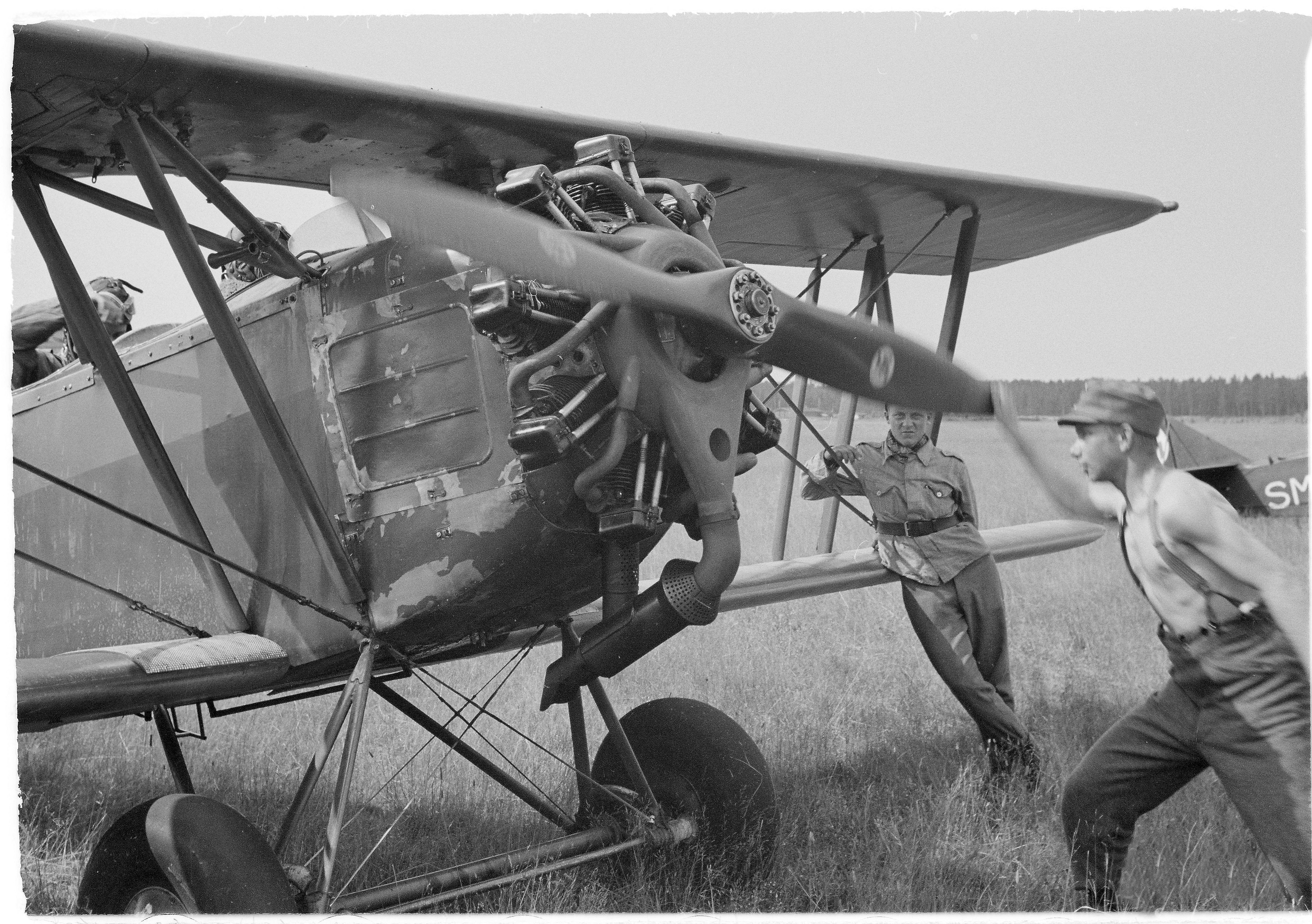 LeSK:n koulukonetta käynnistetään. (Kuvassa on Letov Š-218A). Kuvauspaikka: Kokkola-Kauhava